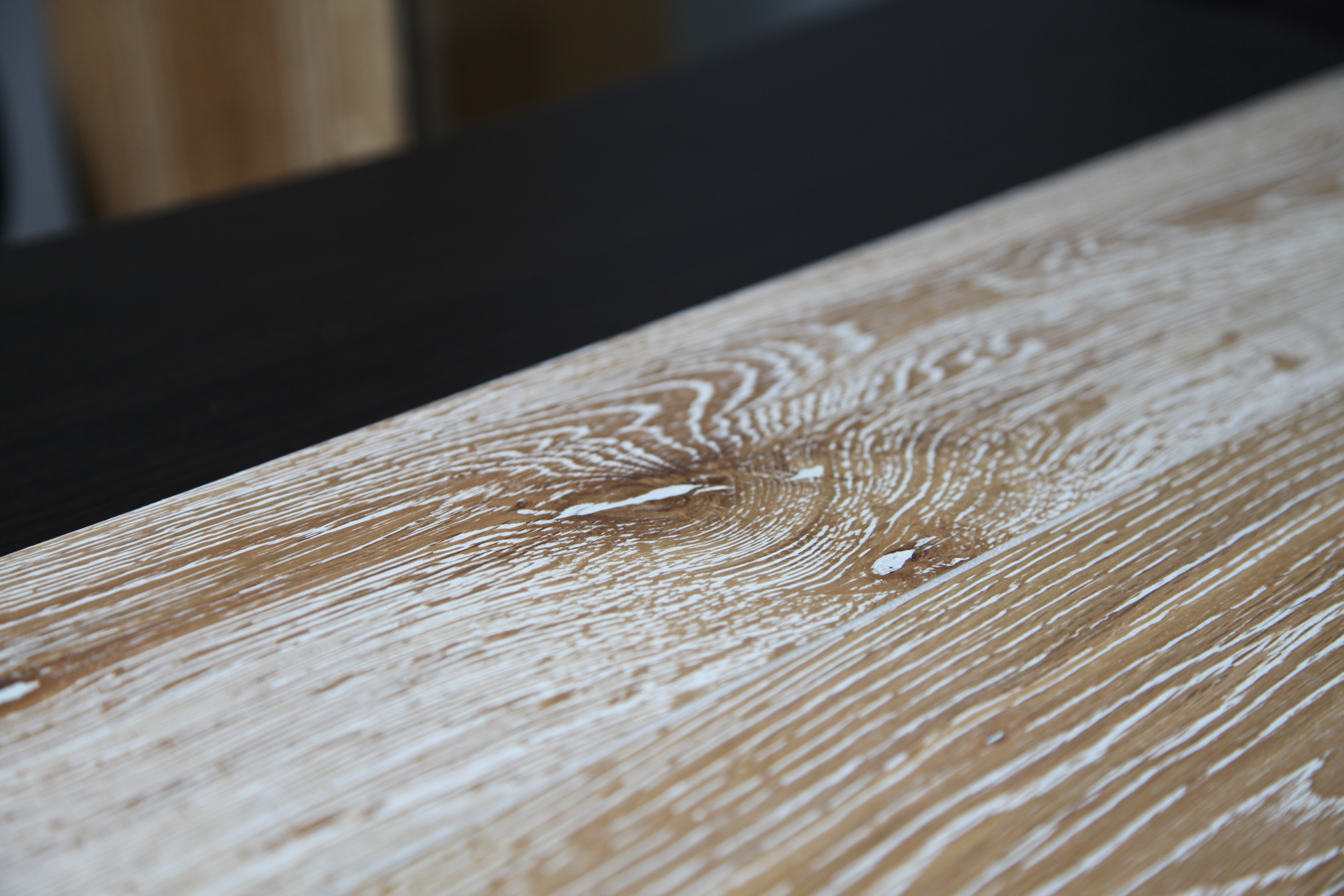 Дуб с брашированием и белой тонировкой крупно